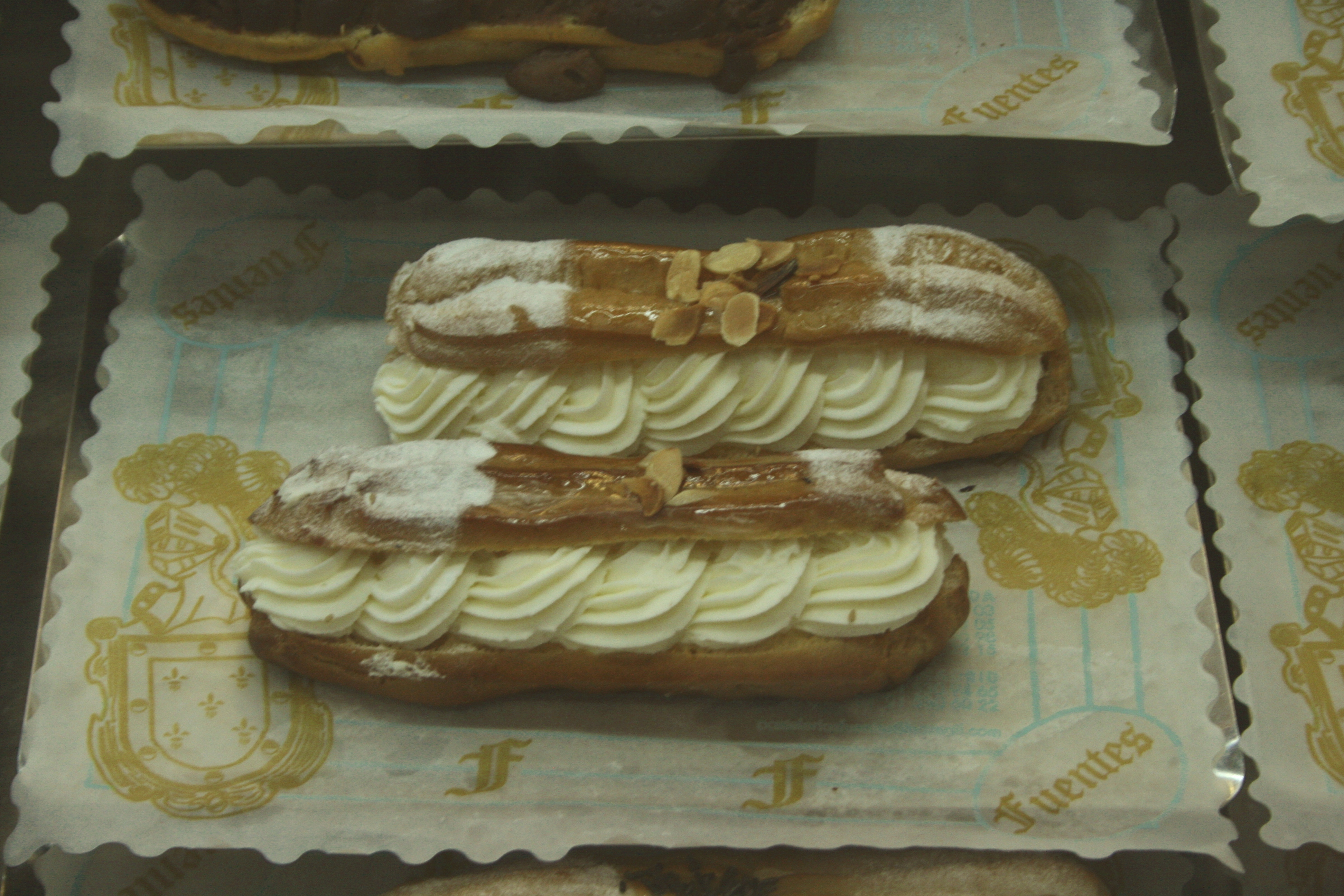 Pepito de crema en una pastelería de Madrid